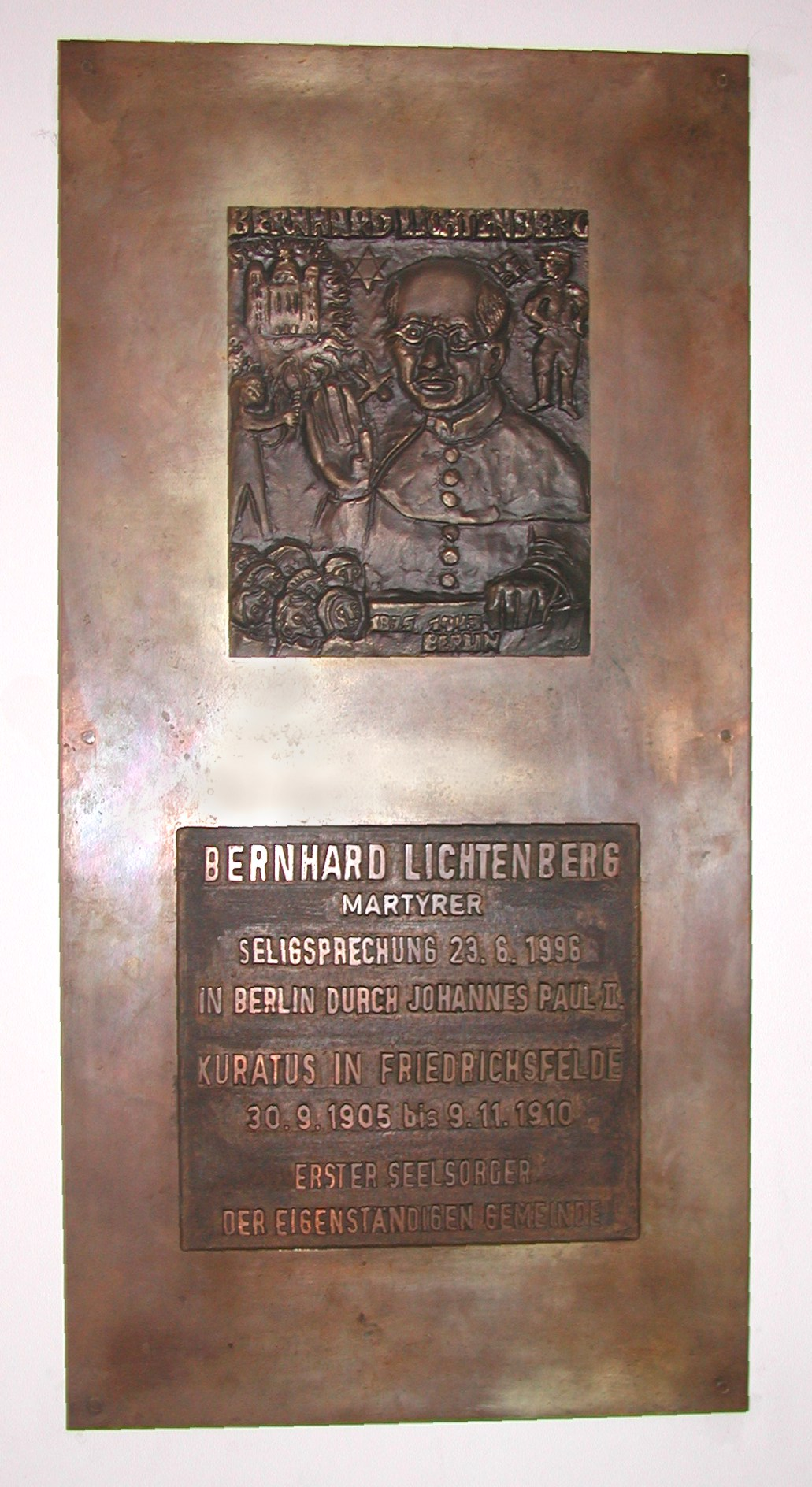 Gedenktafel für Bernhard Lichtenberg im Vorraum der Kirche Zum Guten Hirten